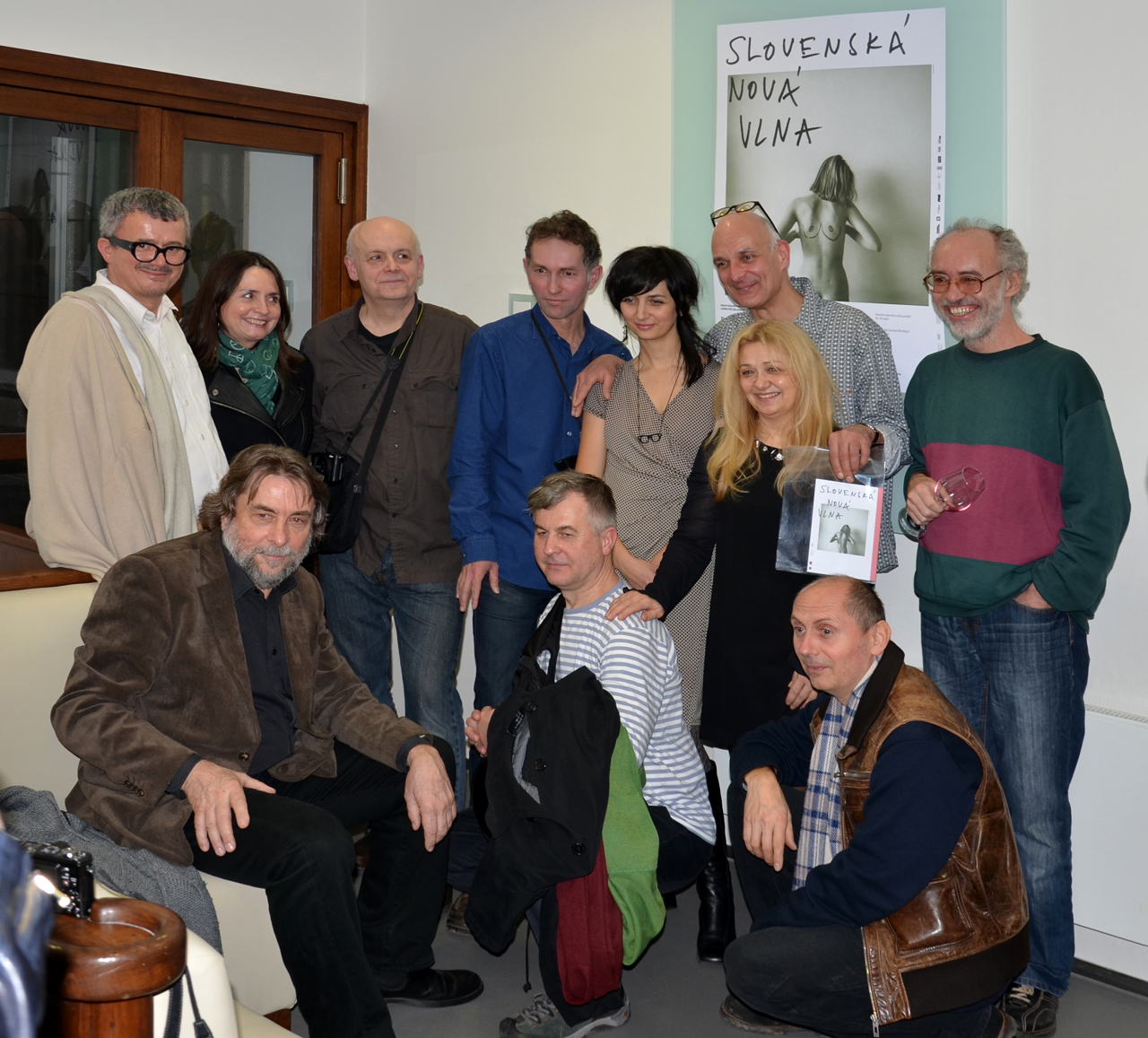 Slovenská nová vlna (2013), foto Jindřich Nosek